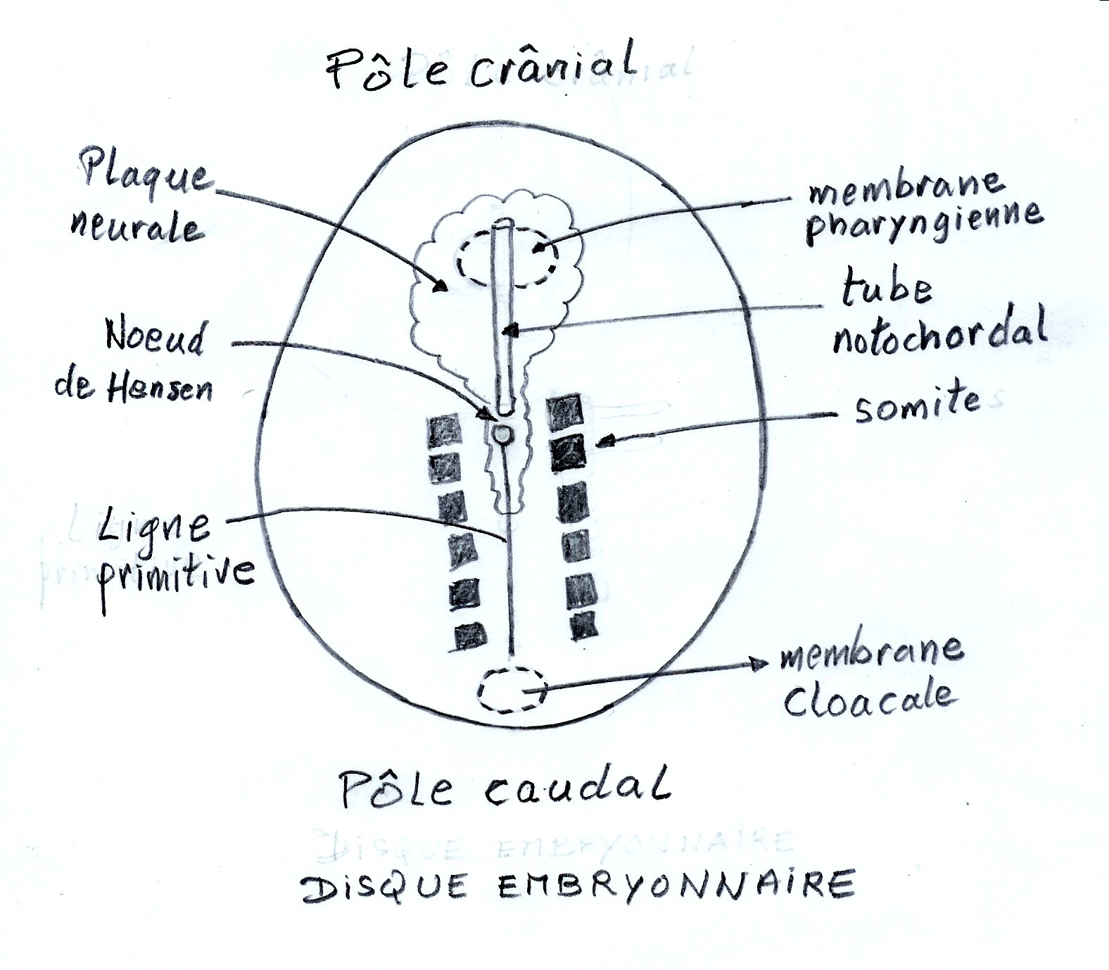 Description: Disque embryonnaire. Montre les structures embryogénétiques du disque embryonnaire en vue dorsale: ligne primitive, nœud de Hensen, plaque neurale, membrane pharyngienne, membrane cloacale, tube notochordal, somites Source: Dessin original. Auteur: Michel Hamels. Cette image est: librement diffusable à titre commercial ou non librement modifiable et l'image modifiée est elle-même librement modifiable et diffusable à titre commercial ou non. Michel Hamels 28 mars 2006 à 21:52 (CEST)